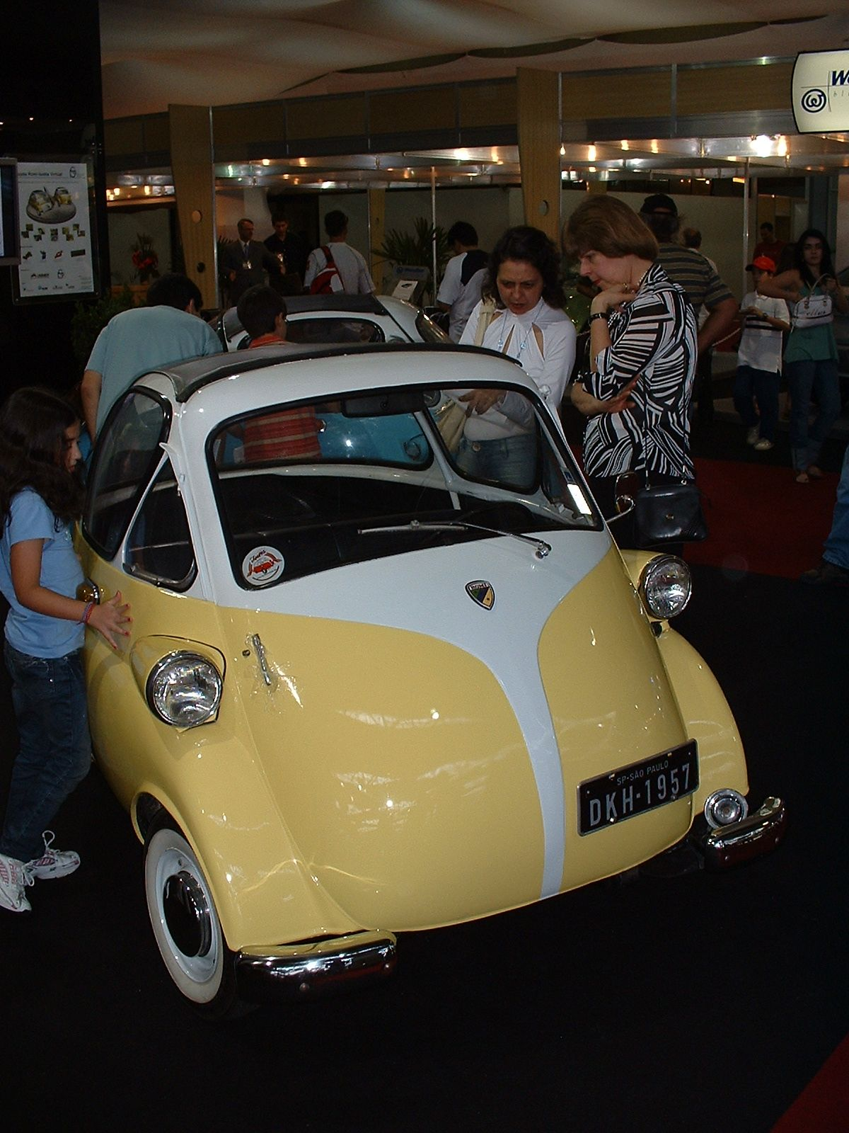 Romi Isetta del 1957 su licenza Iso